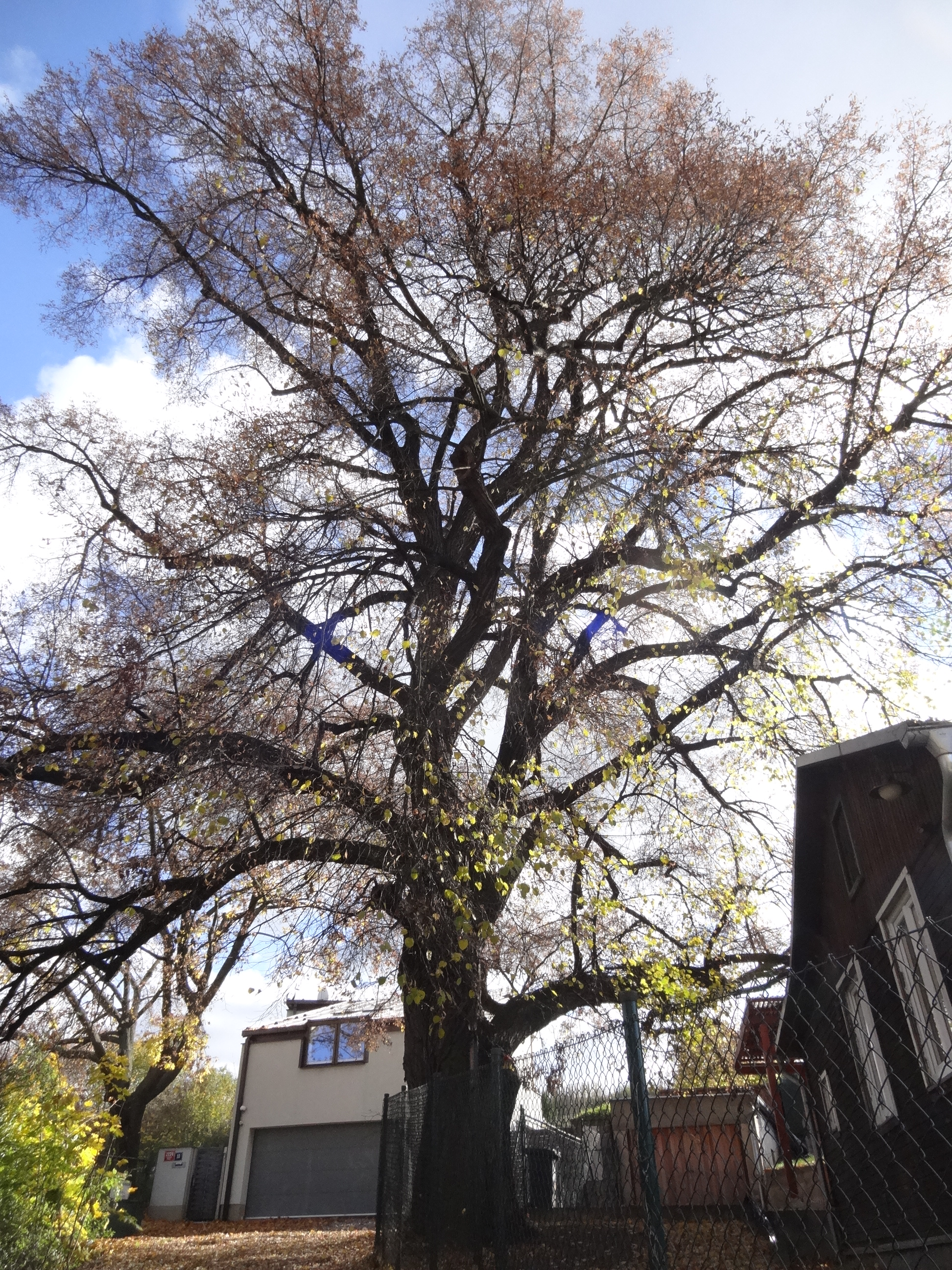 Komořany - památná lípa srdčitá v ulici Na Šabatce